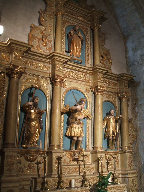 Abbaye de Saint-Génis-des-Fontaines (Pyrénées-Orientales, Languedoc-Roussillon, France) : retable Saint-Michel conservé dans l'église abbatiale (XVIIIème siècle)